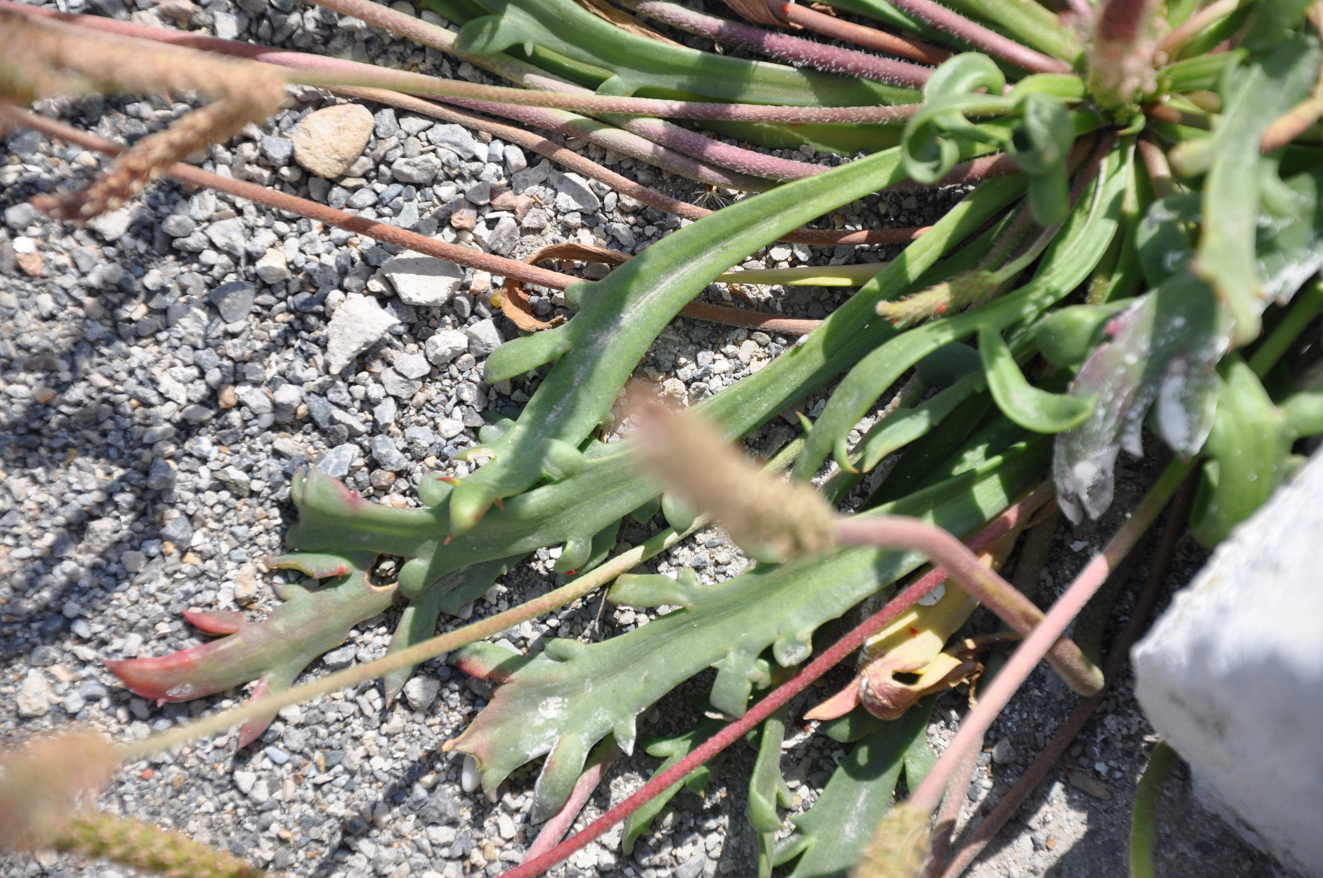 Detalle de las hojas de (Plantago macrorrhiza) en Ceuta, España.